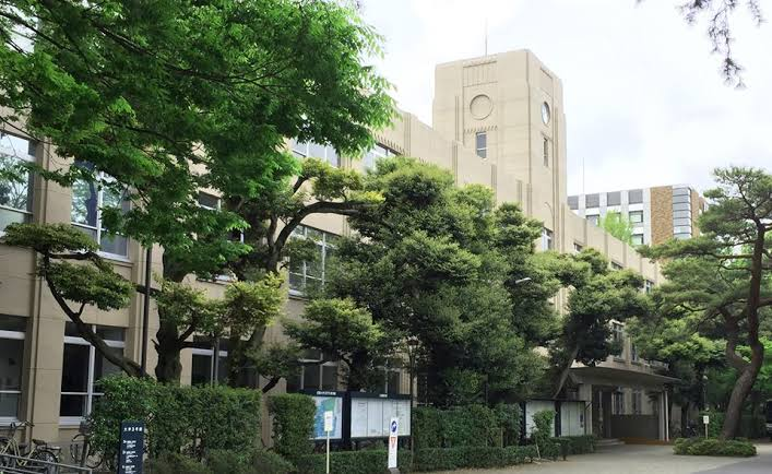 3号館（登録有形文化財）